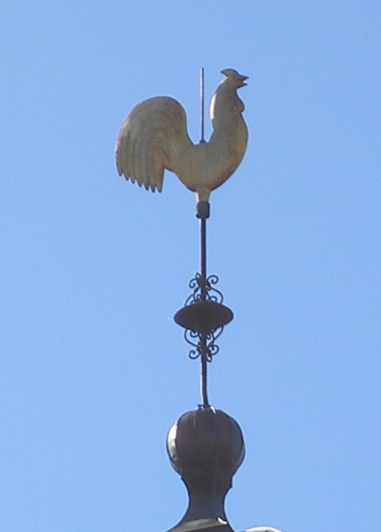 Kågedalens kyrka i Kusmark, Skellefteå kommun. Närbild på kyrktupp. 2007 utsedd av Kyrktuppsfrämjandet till "Årets kyrktupp"